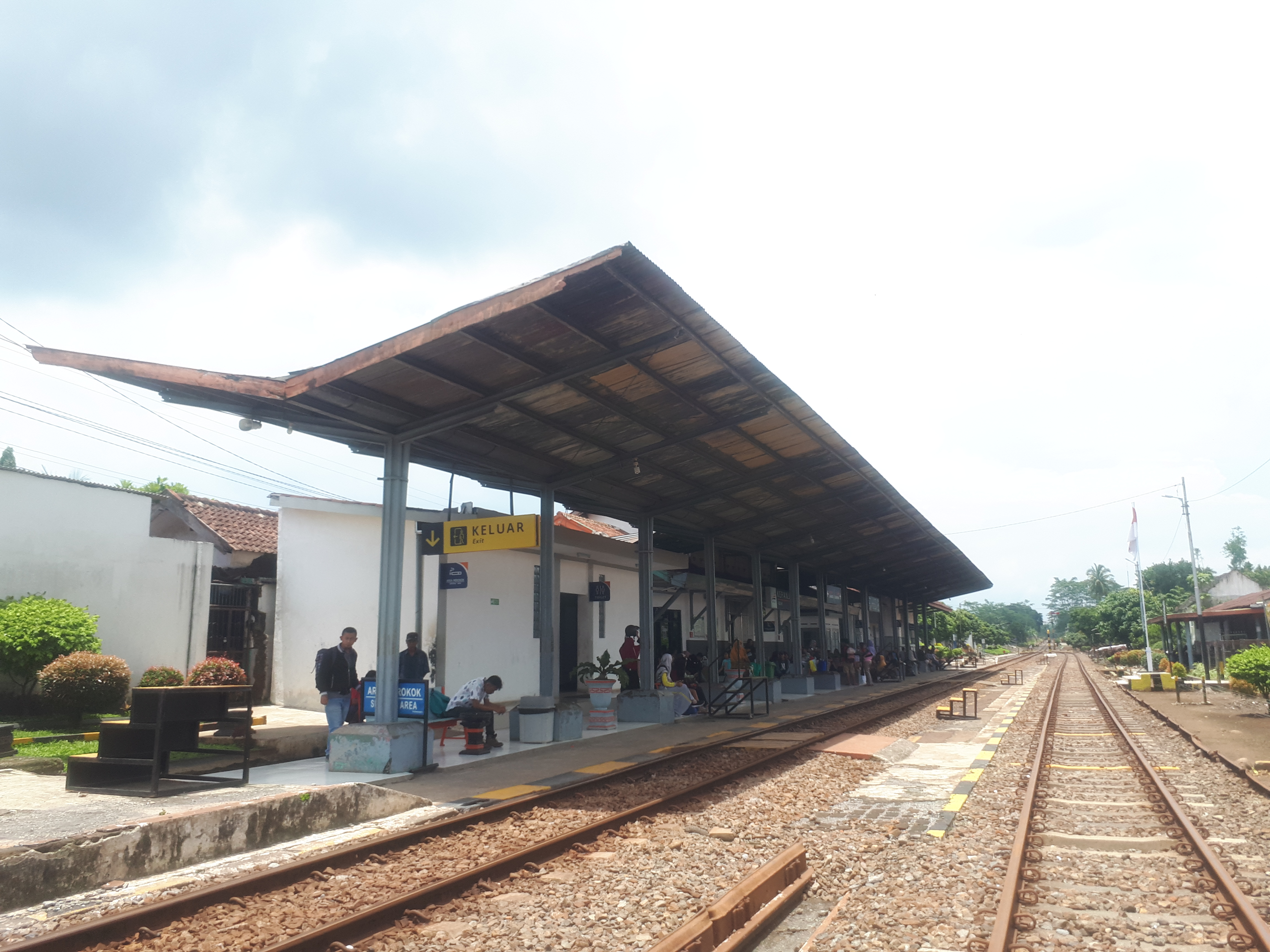 Kondisi peron di Stasiun Kepanjen tahun 2020